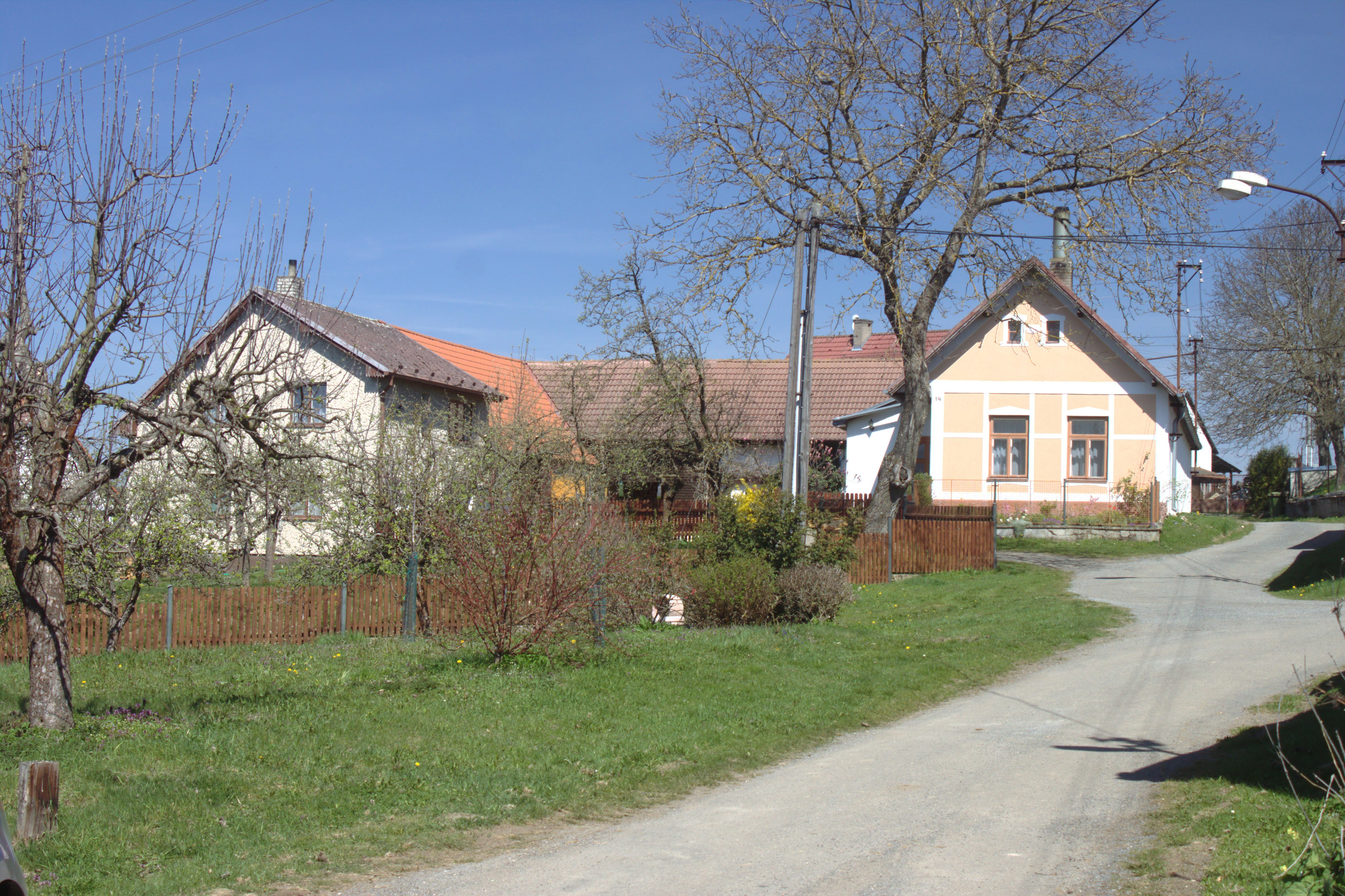 Chalupy ve vesnici Blanička